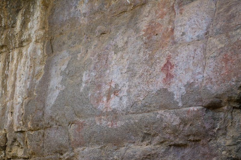 huapalcalco